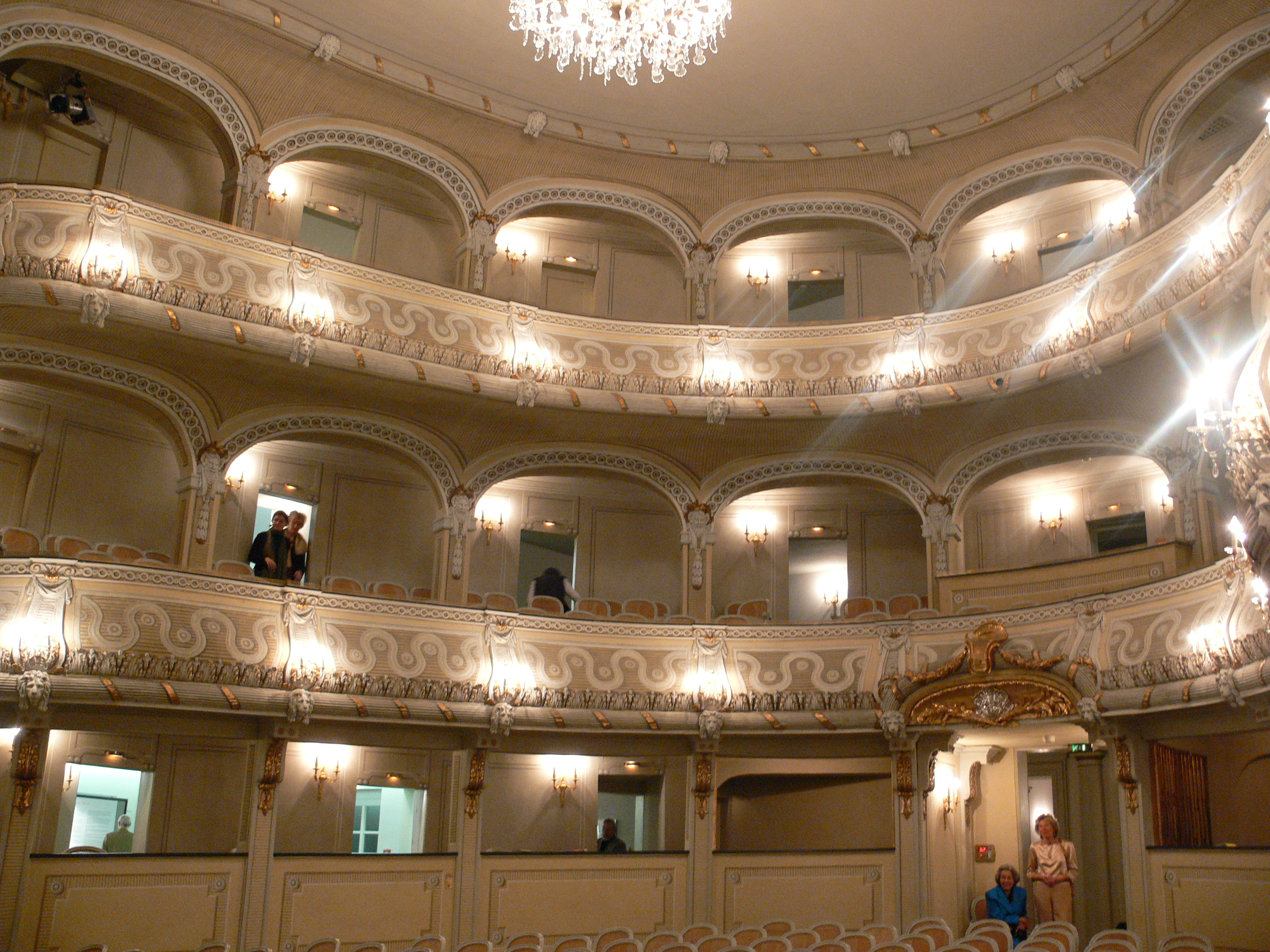 Schlosstheater Schwetzingen (so genanntes „Rokokotheater“) Blick vom Parkett zu den Rängen